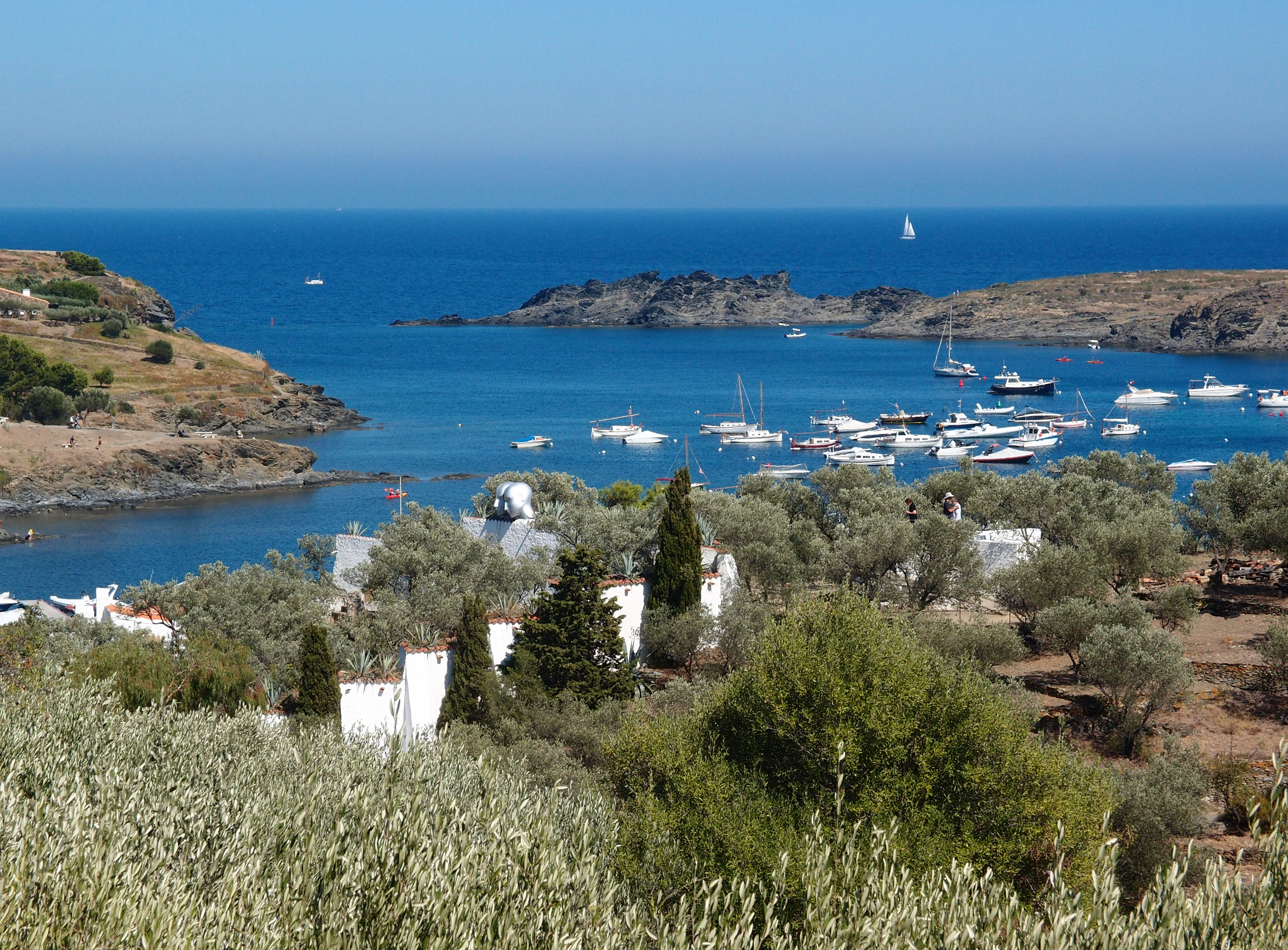 Portlligat (Alt Emporda / Katalonien) Datum: 04.09.2013 Urheber: M. Pfeiffer alias Benutzer:Gordito1869 Quelle: privates Fotoarchiv des Urhebers